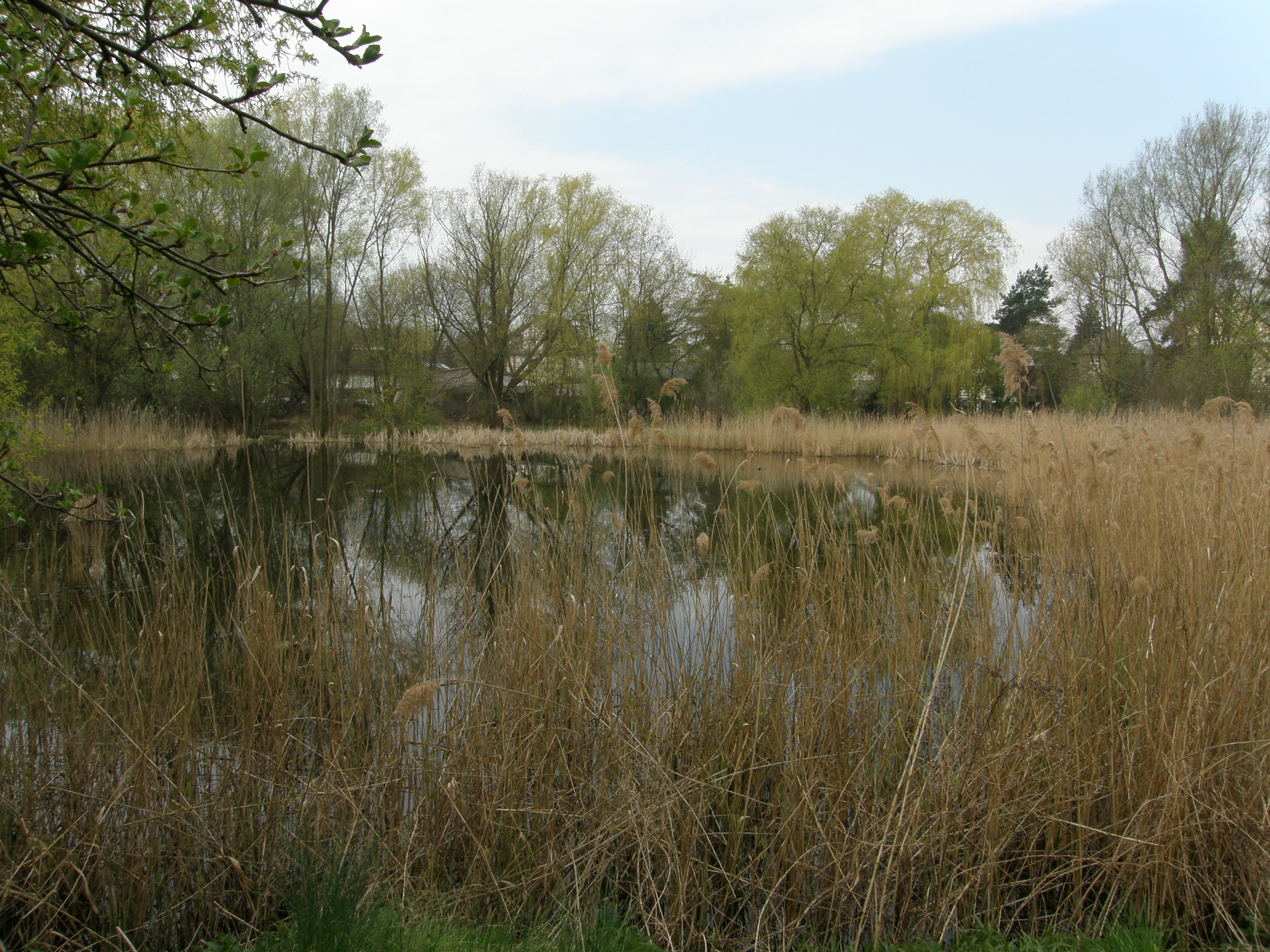 Berlin-Mahlsdorf, Rohrpfuhl